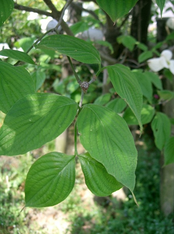 Benthamidia florida